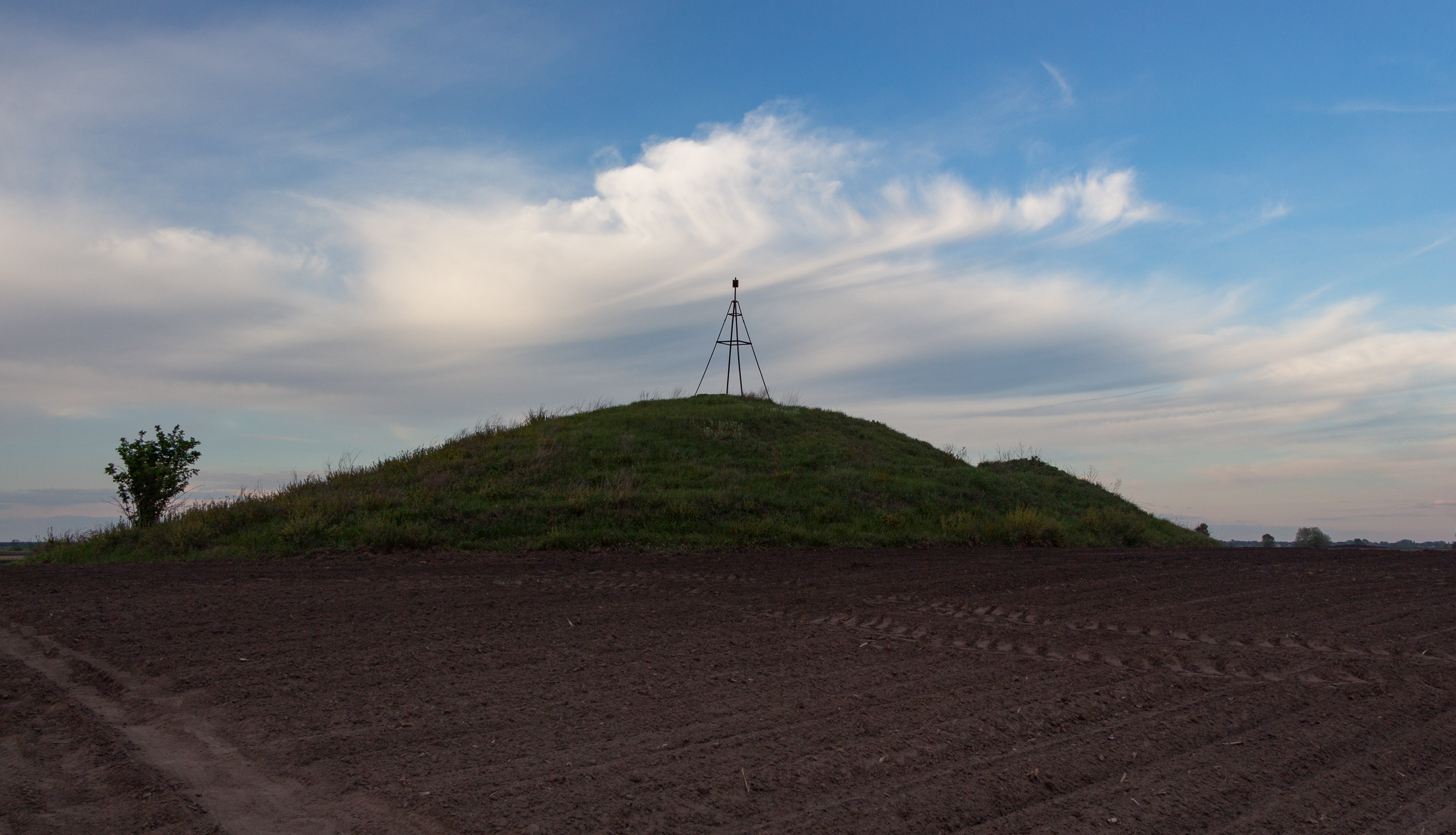 «Нечаївщина», Бориспільський район, Іванківська сільська рада